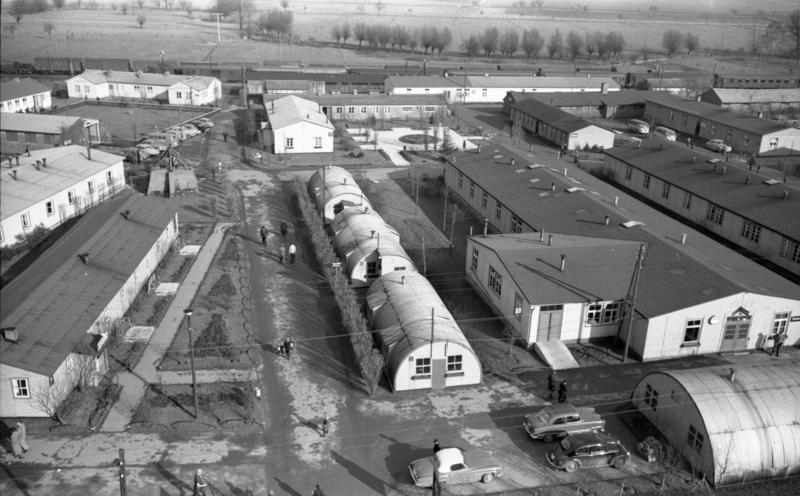 Lager Friedland Ankunft der Wissenschaftler aus Sochumi (Lageraufnahmen und Ankunft von Aussiedlern aus Polen), 12. Februar - 16. Februar 1958